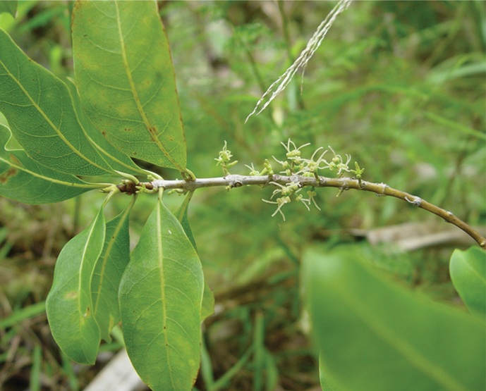 Coprosma temetiuensis